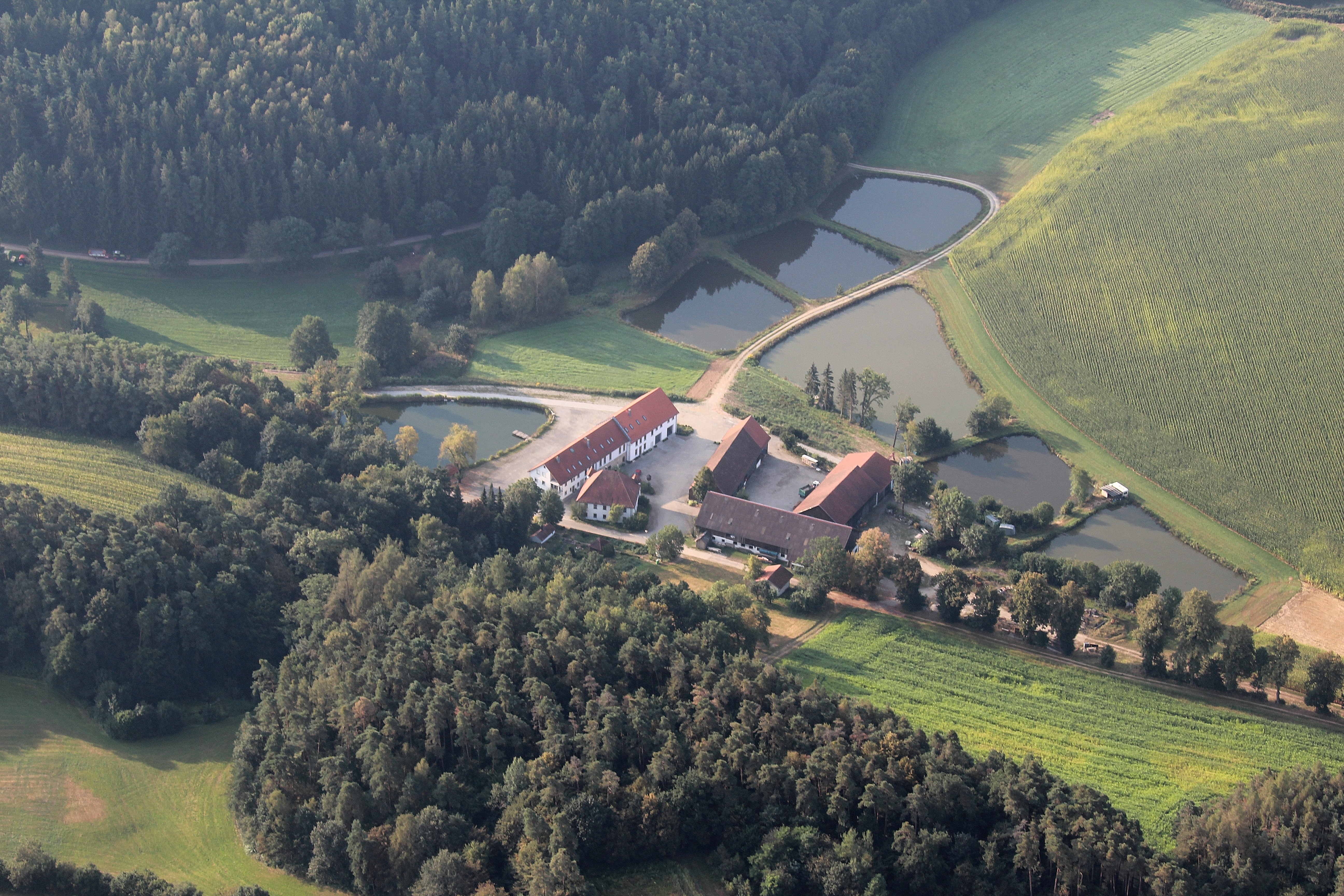 Büchlhof, Stadt Neunburg vorm Wald, Landkreis Schwandorf, Oberpfalz, Bayern